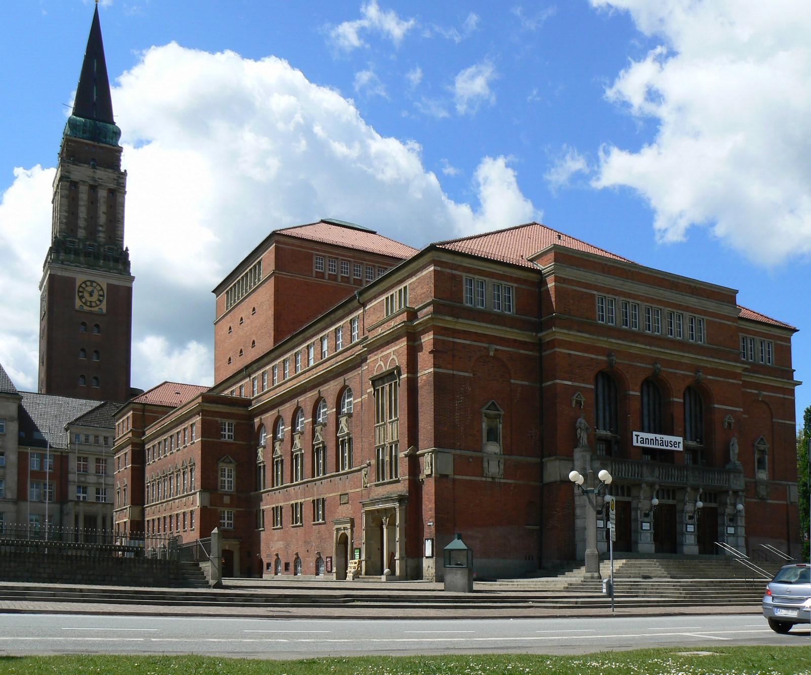 Kieler Opernhaus. Bauzeit: 1905–1907, Architekt: Heinrich Seeling, Ansicht: Haupteingang mit dem Rathausturm im Hintergrund.